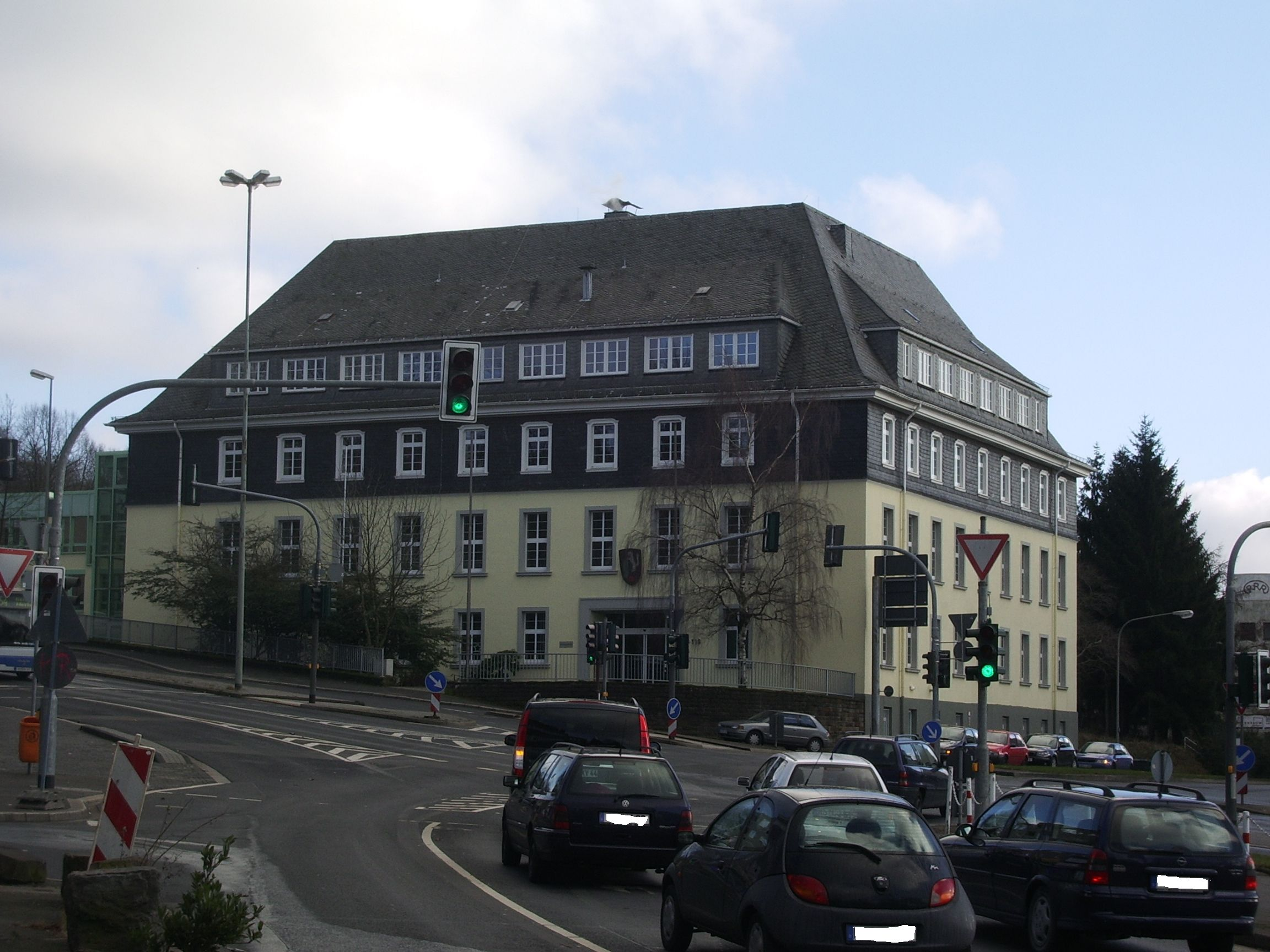 Amtsgericht Remscheid (Hauptgebäude) von der Königstraße (?) aus gesehen, links im Bild der Anbau